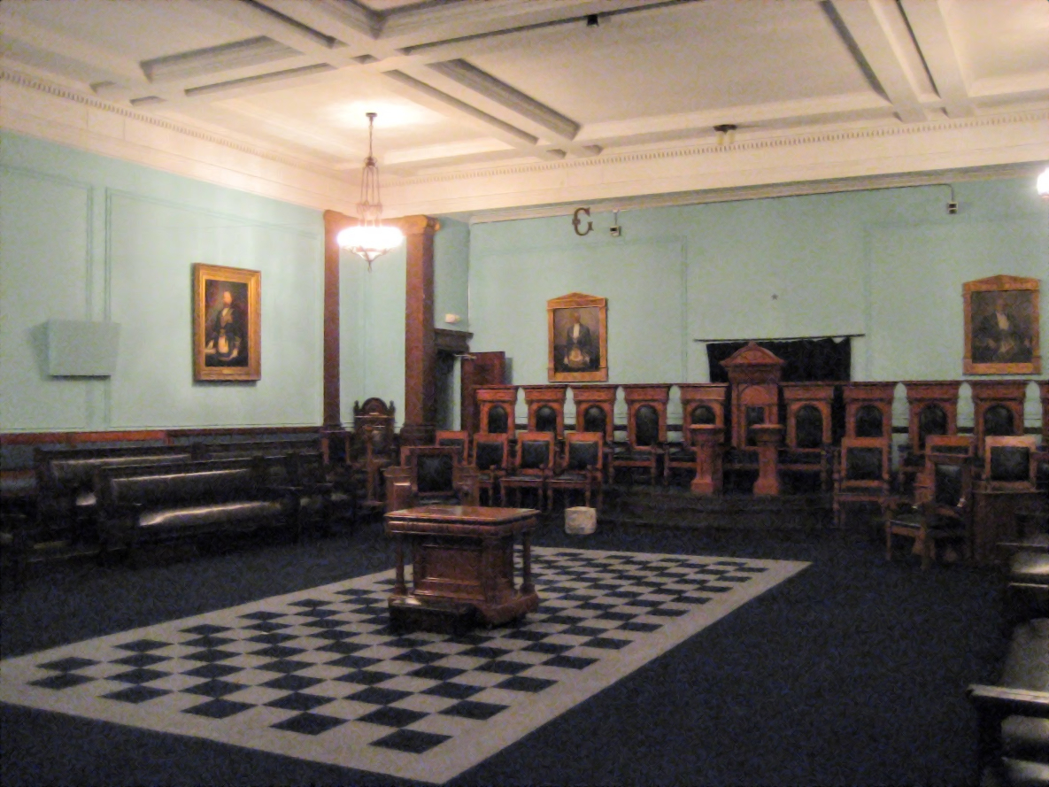 Loge maçonnique des Coeurs-Unis, Montréal Photo prise par Déclic